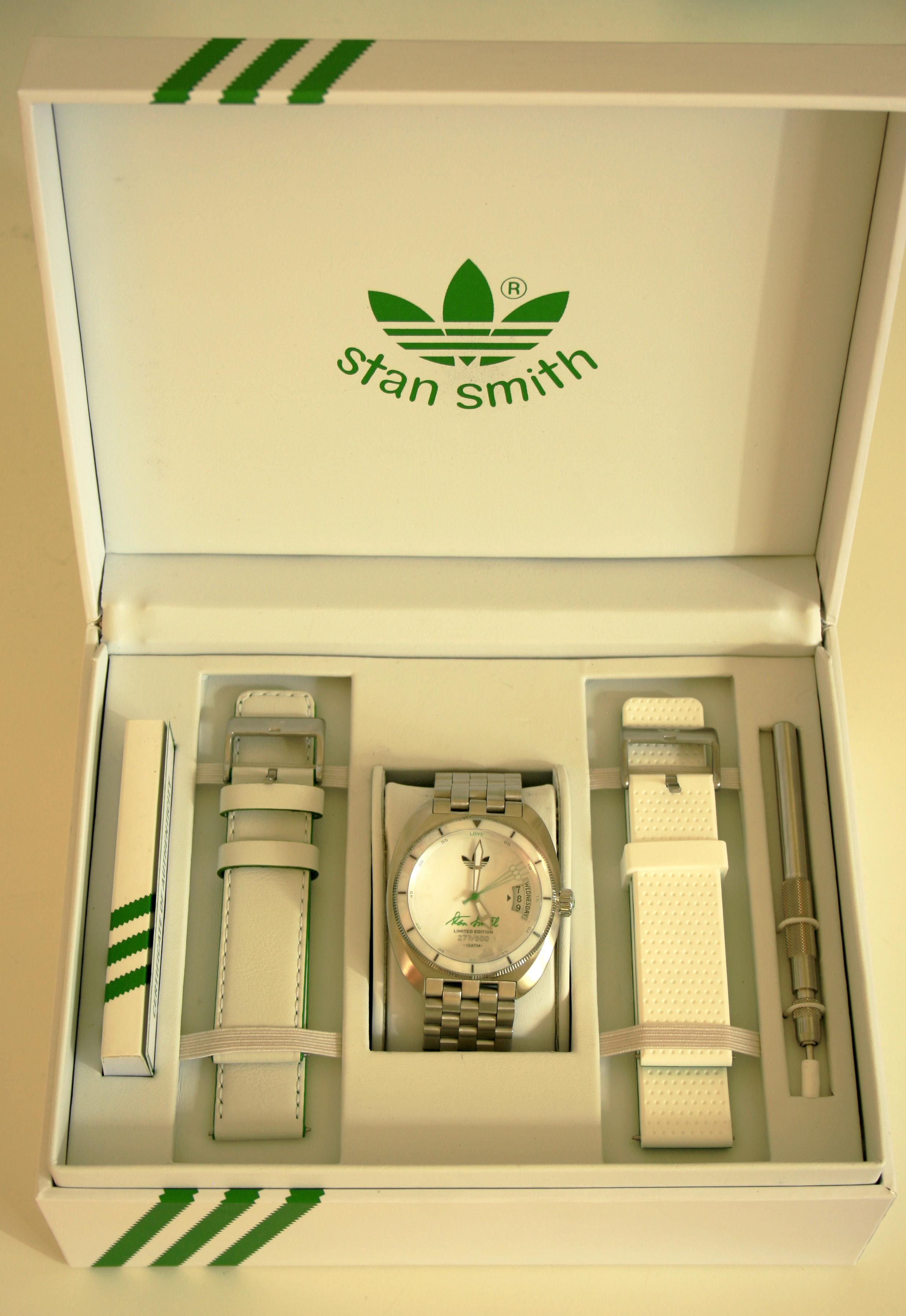 Adidas ADH-9047 Stan Smith Limited Edition Uhren Box Set (500 Stk.). Produziert von Fossil im Jahr 2013.